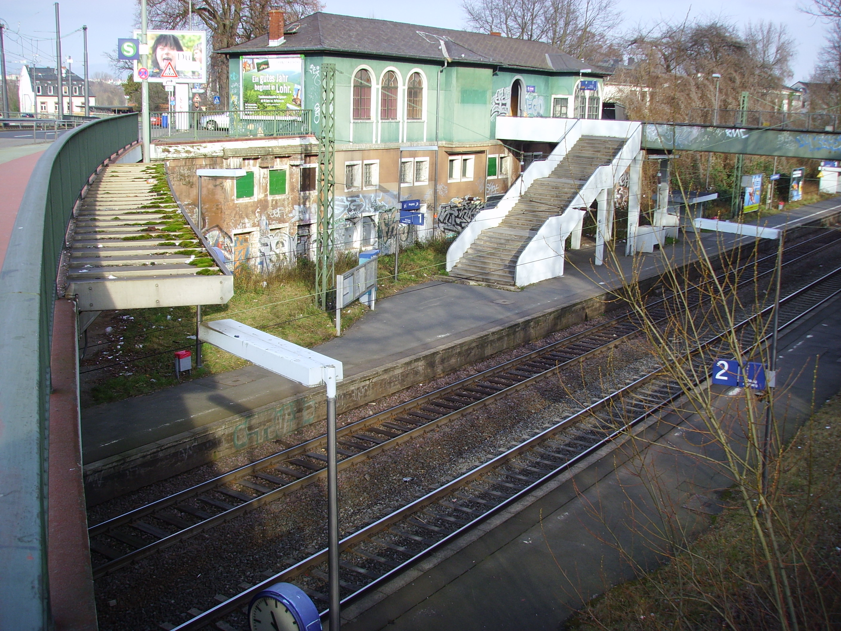 S-Bahn-Station in Frankfurt am Main-Eschersheim